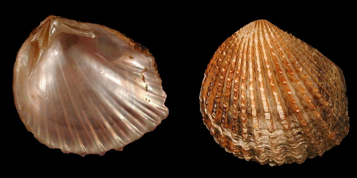 Neotrigonia margaritacea (Lamarck, 1804) (Trigonioida, Bivalvia), Victoria, Australien